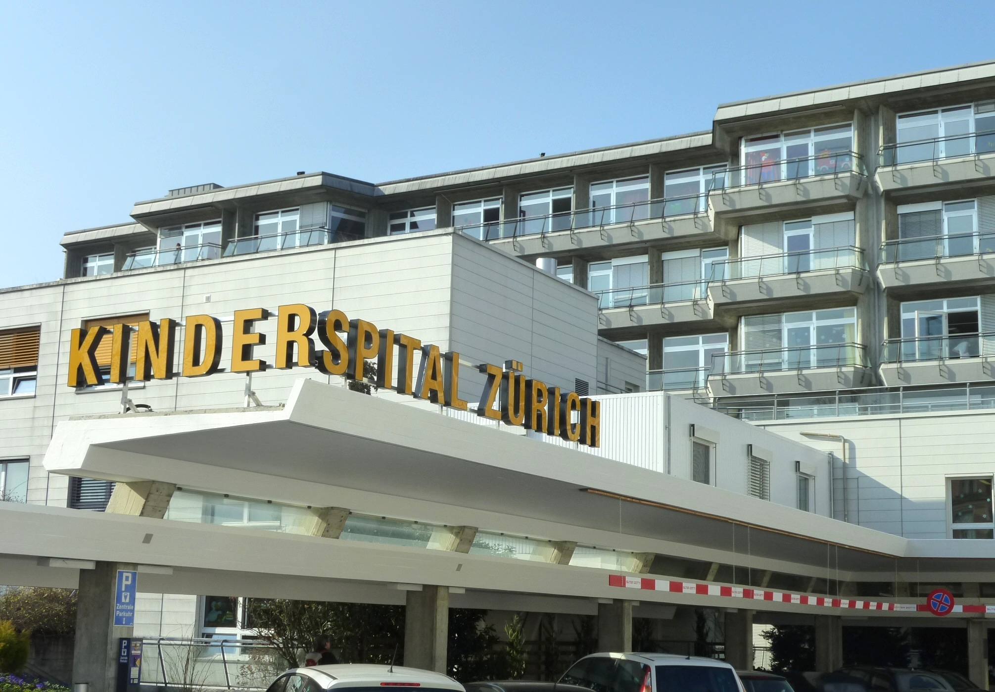 Universitätsspital Zürich